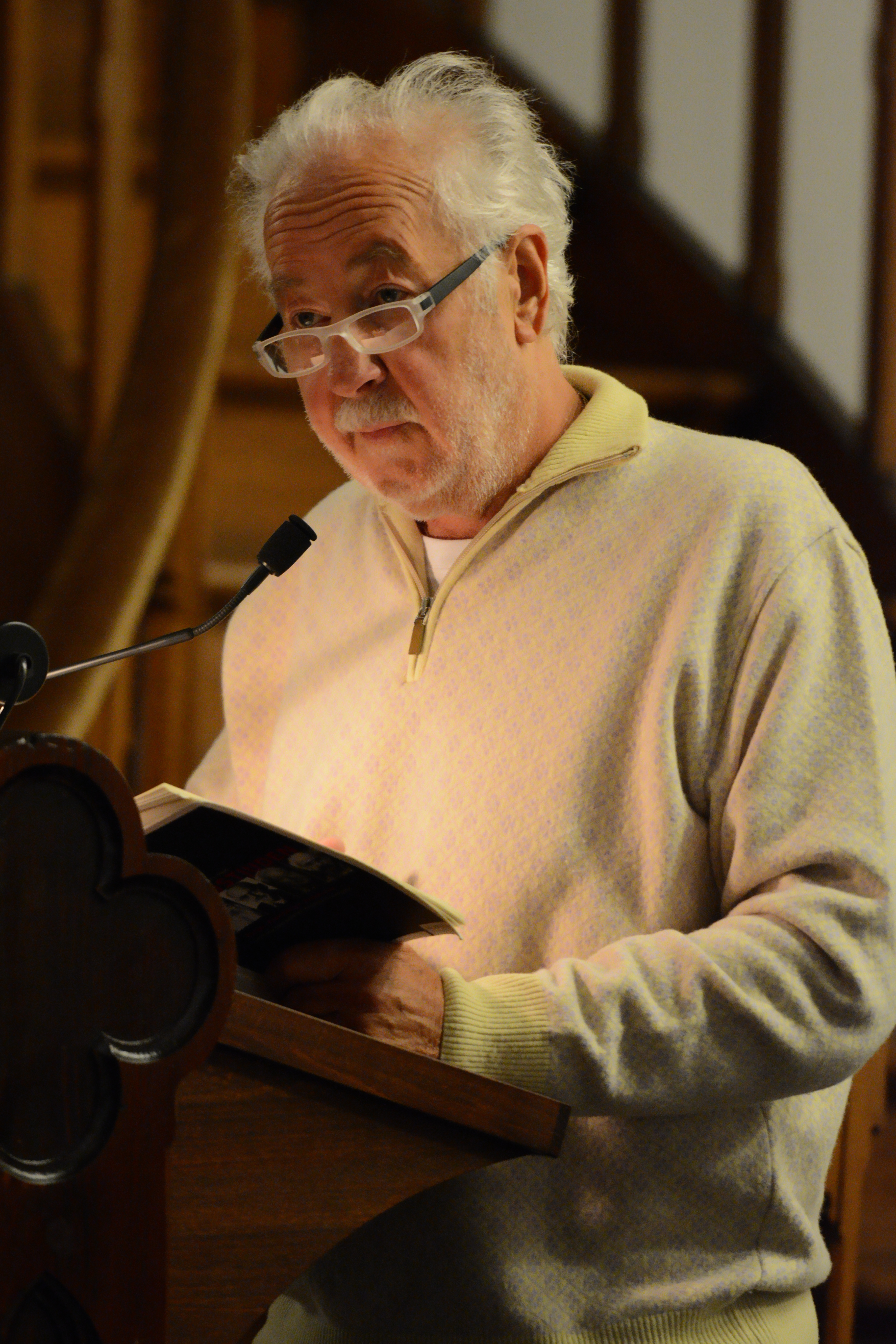 Ludger Heid bei einem Vortrag zum Thema Die Ostjuden in Duisburg anlässlich eines Jüdischen Abends, veranstaltet durch den Heimatverein Hamborn.